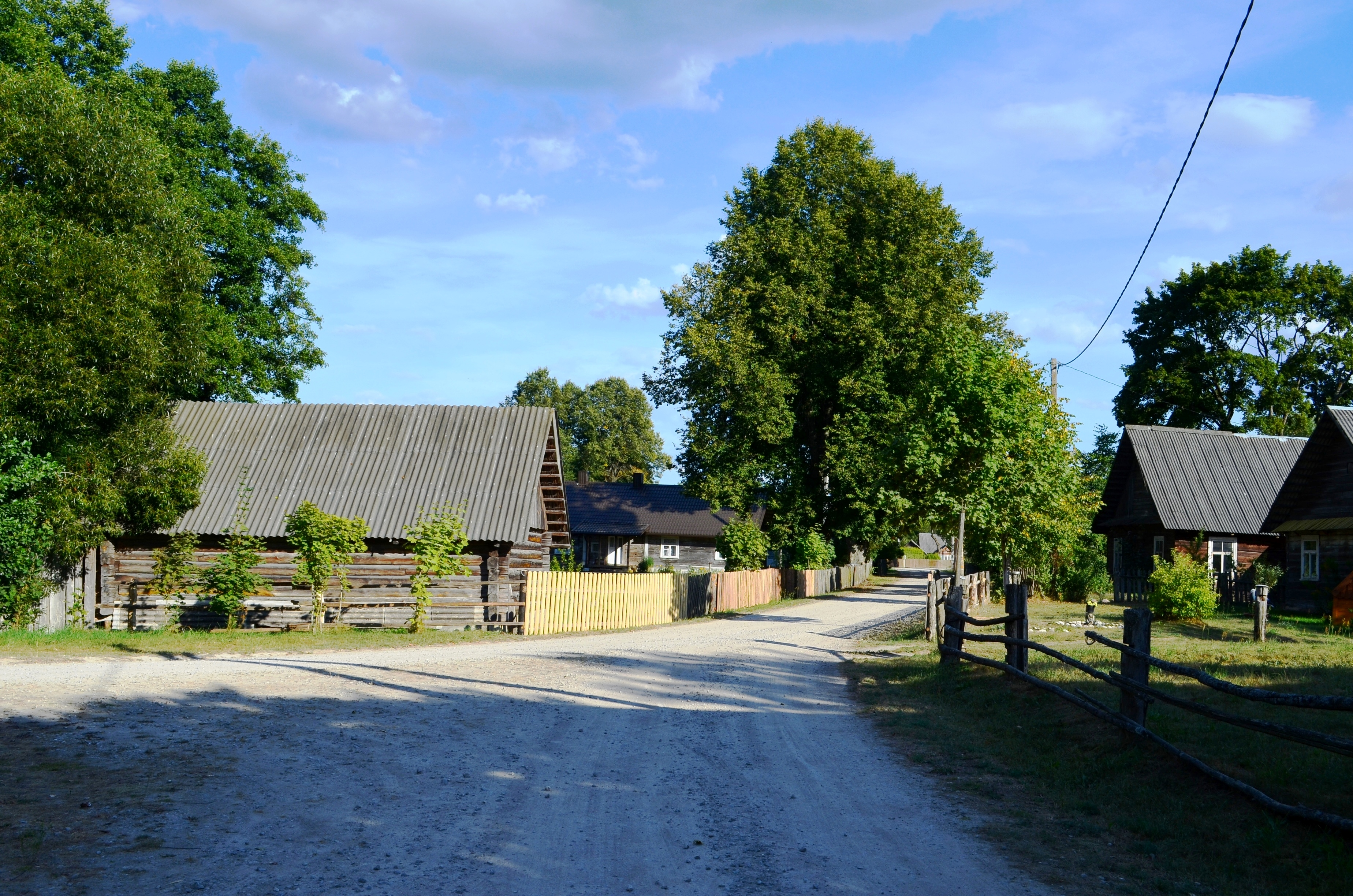 Musteika, Varėnos r.